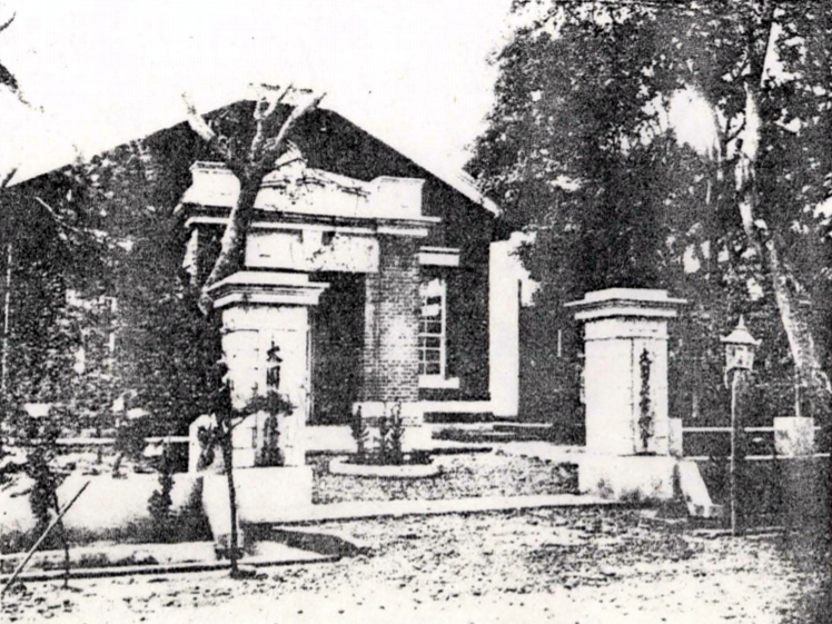 中文（台灣）: 新竹州桃園郡大園庄役場